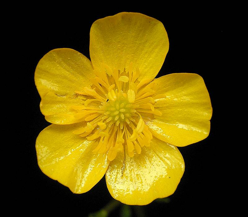 Ranunculus repens